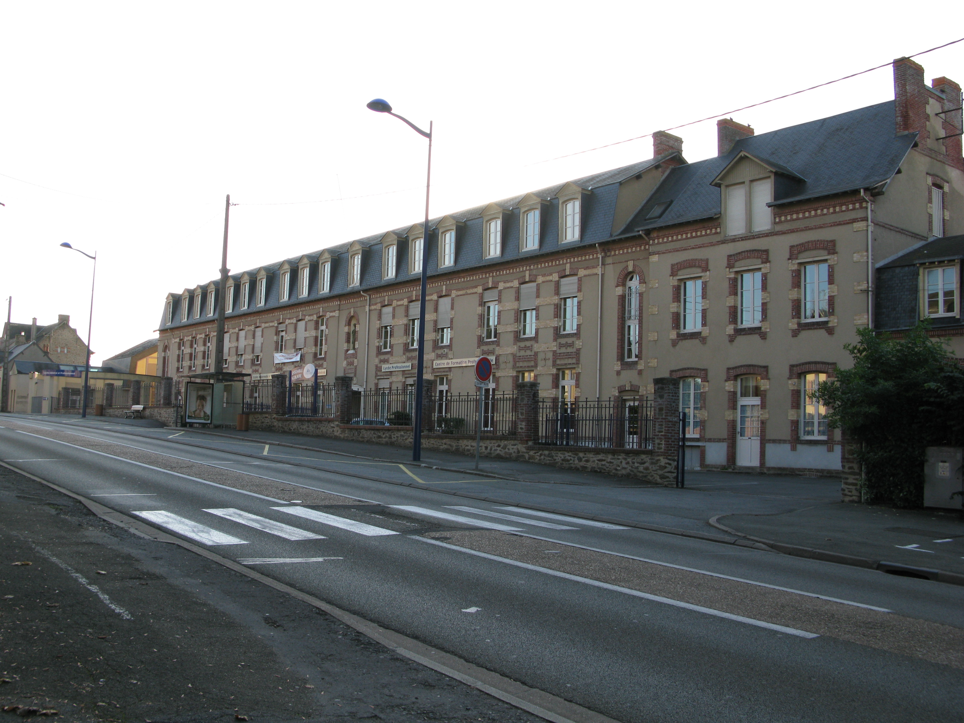 L'école Don Bosco à Mayenne.